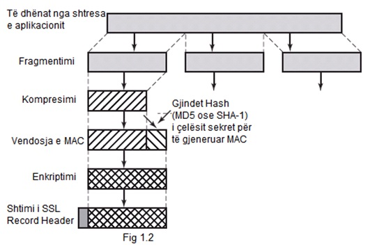 Infrastruktura e tls-it